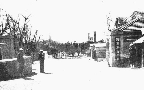 中华民国海军军官学校青岛校址